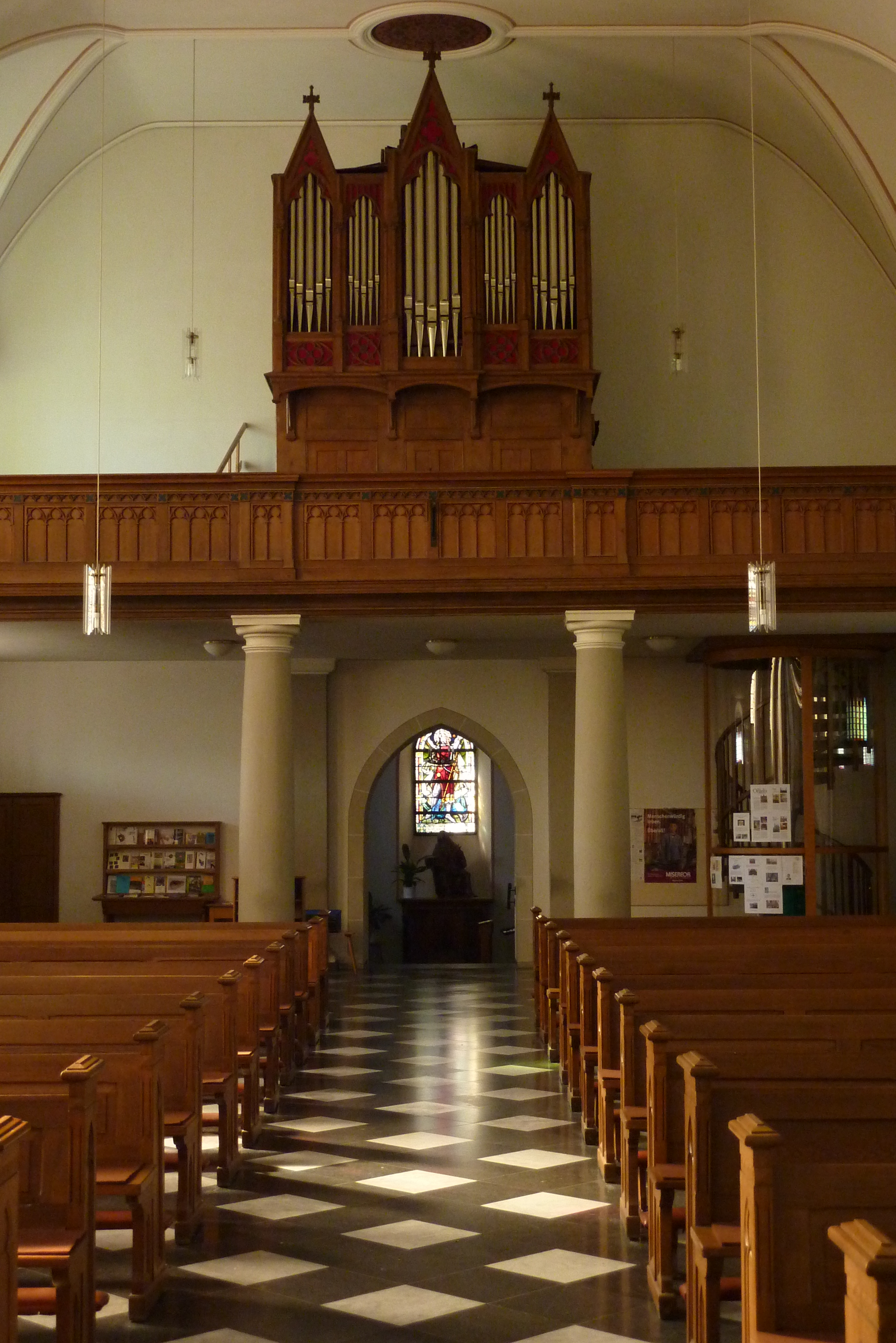 katholische Pfarrkirche St. Nikolaus in Kuchenheim